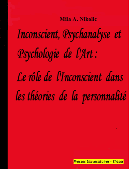 Mila a. Nikolić - Inconscient, Psychanalyse et Psychologie de l'Art: Le rôle de l'Inconscient dans les théories de la personnalité